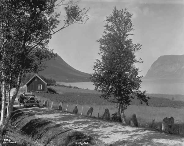 Skjærstad in Harstad, Norway